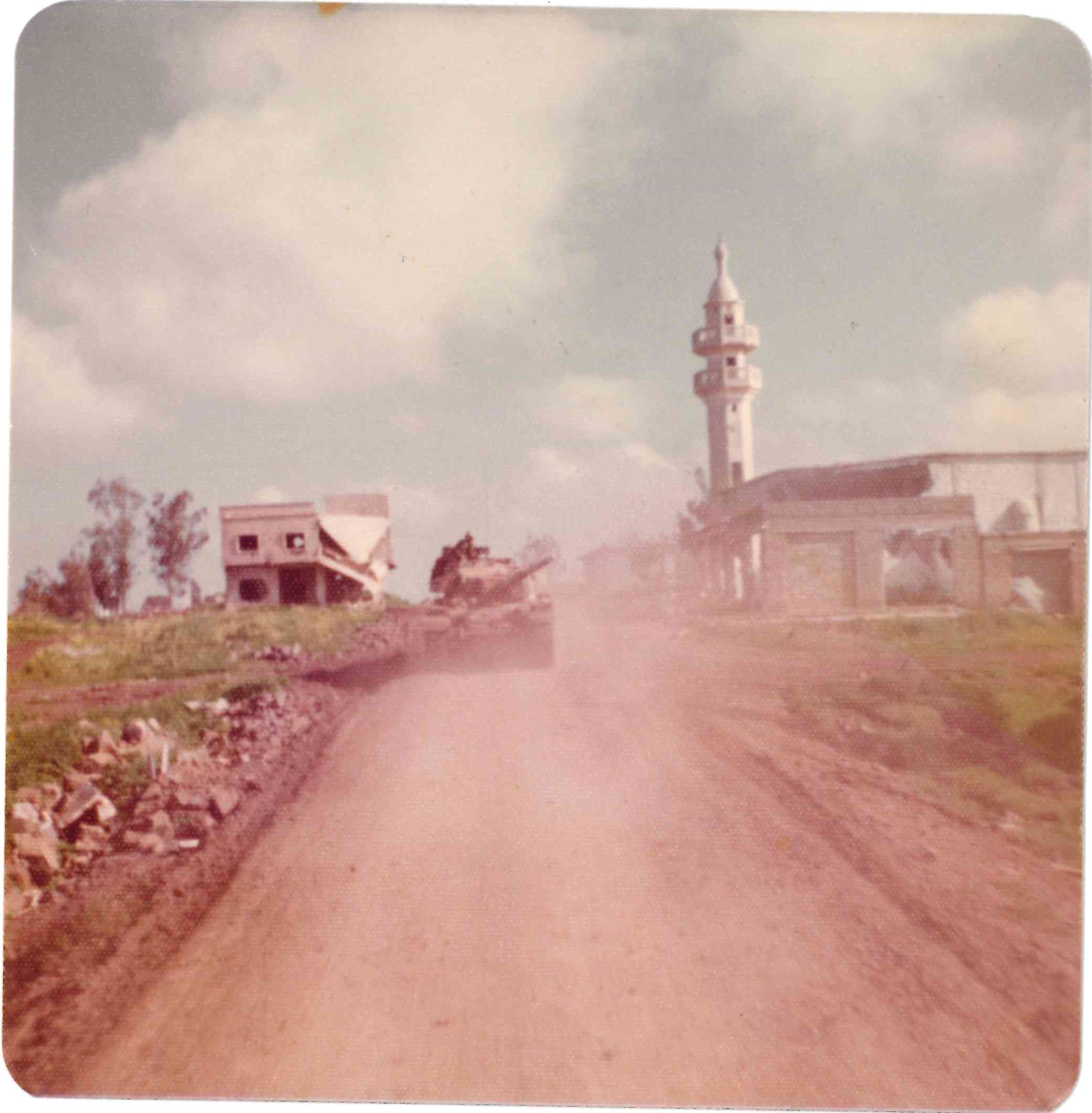 טנק שוט של כוח נתי בחושניה. צולם במהלך מלחמת יום הכיפורים או בזמן מלחמת ההתשה במובלעת הסורית.